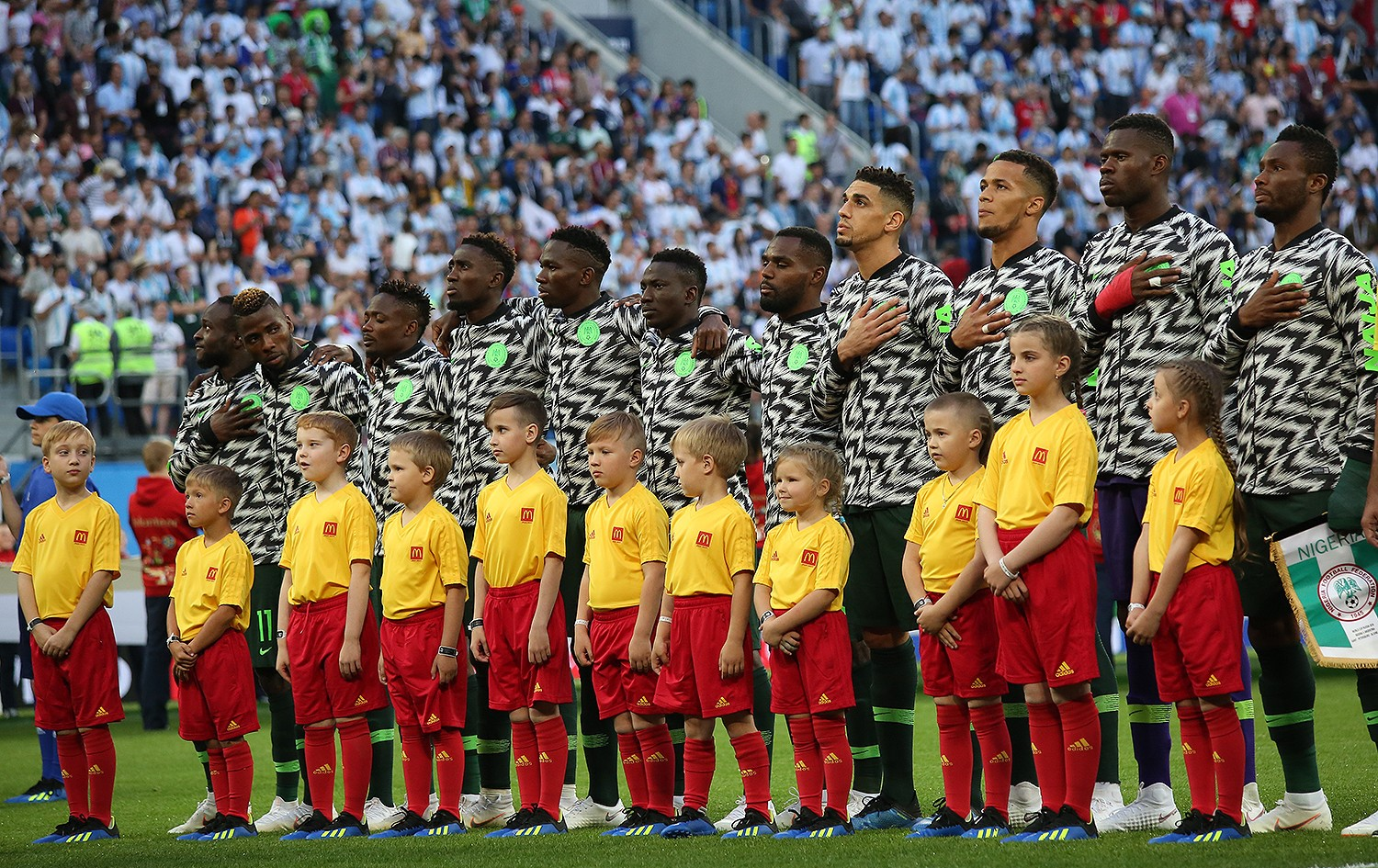 Гол Рохо в концовке выводит Аргентину в плей-офф чемпионата мира